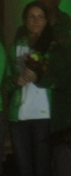 Akvilė Stapušaitytė